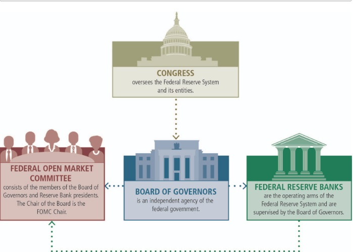 包括联邦公开市场委员会，董事会，联邦储备银行